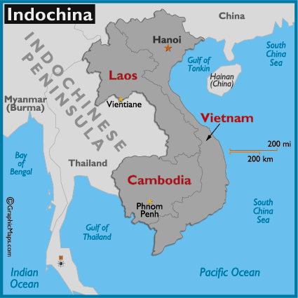 Mapa do território Indochinês (Vietnã, Cambodja e Laos).